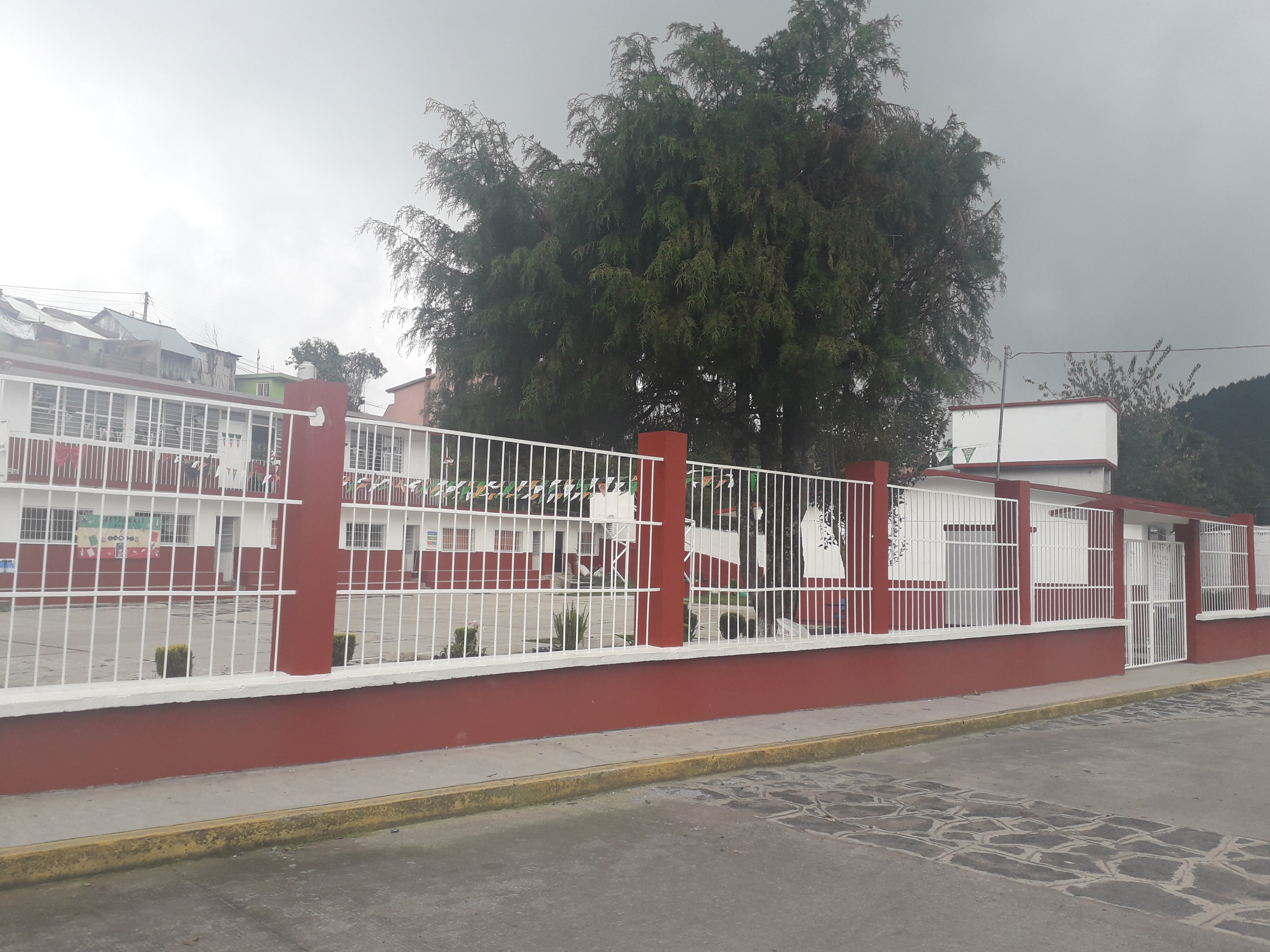 Escuela